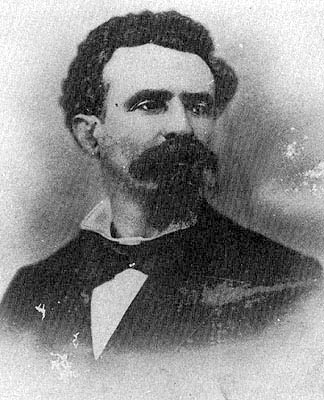 Militão de Azevedo, fotógrafo brasileiro